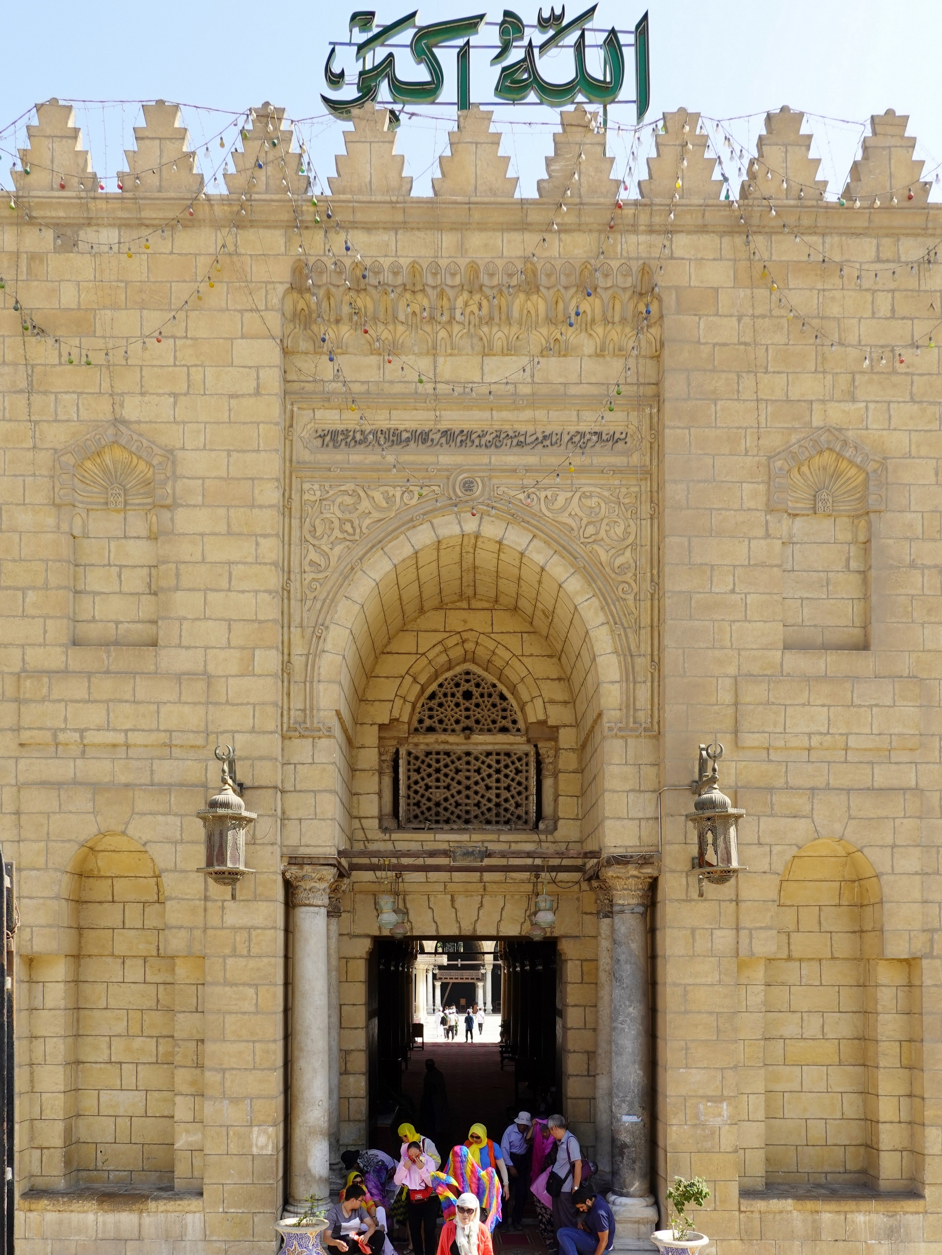 Eingang zur Amr-ibn-Al-Aas-Moschee in Kairo, Ägypten